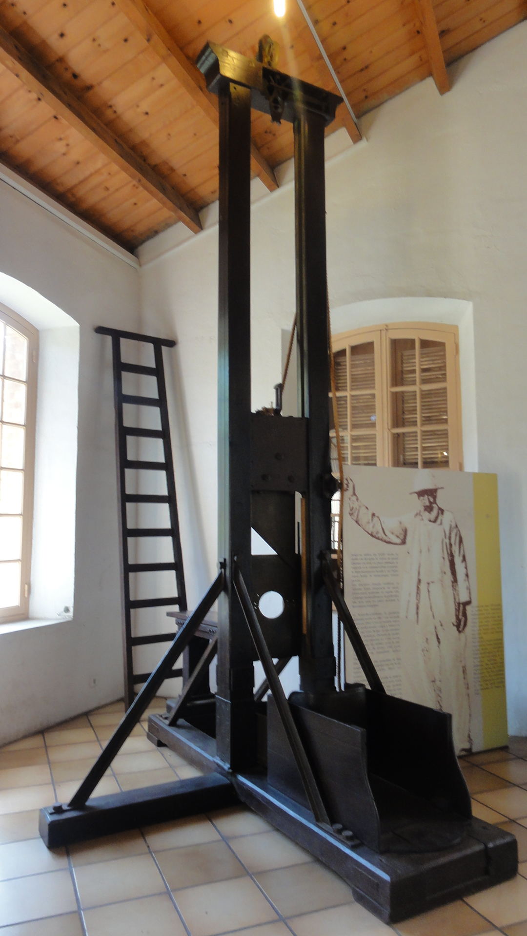 Musée de Bourail